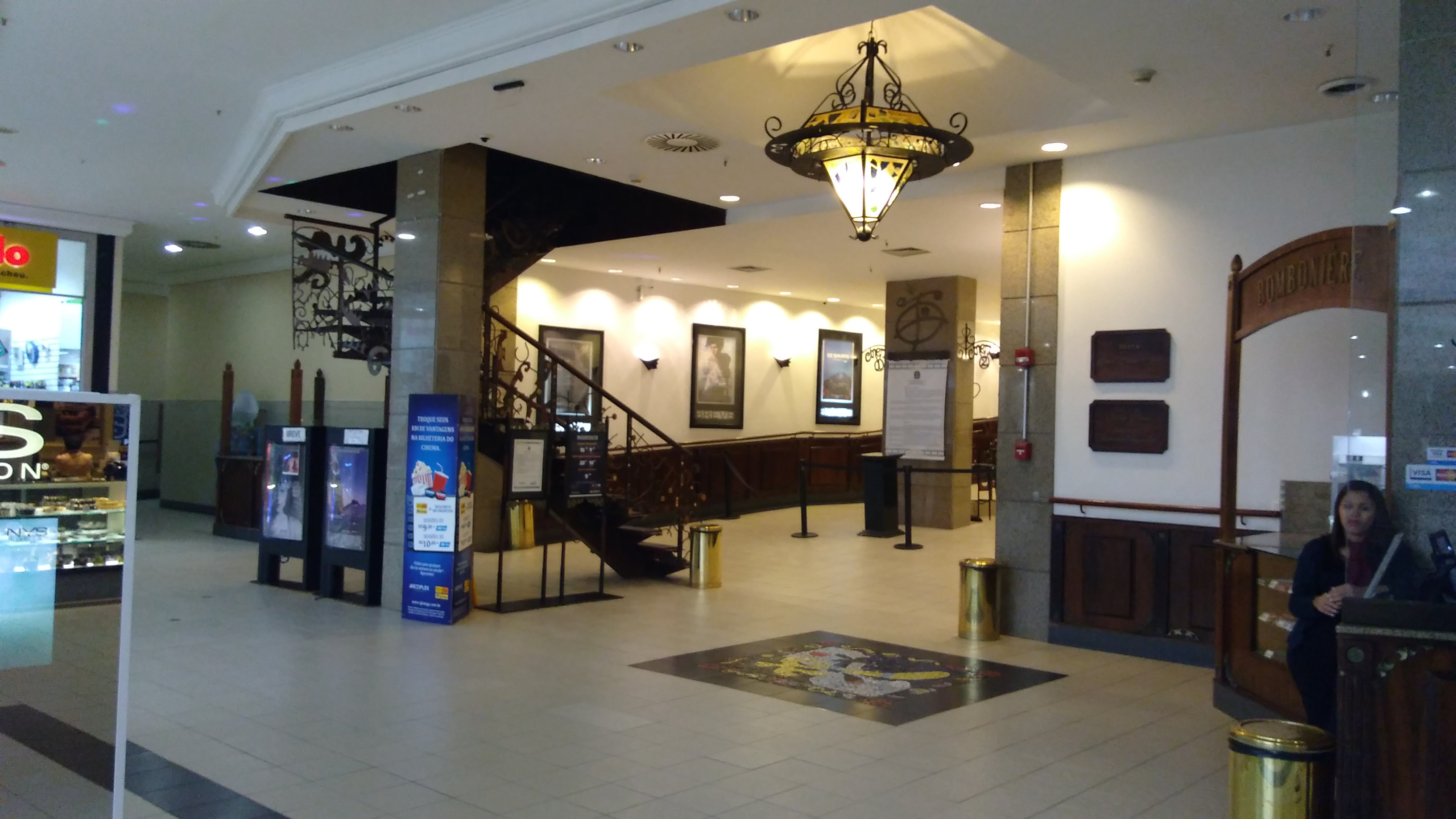 Vista externa do Arcoplex del Paseo de Fortaleza, CE